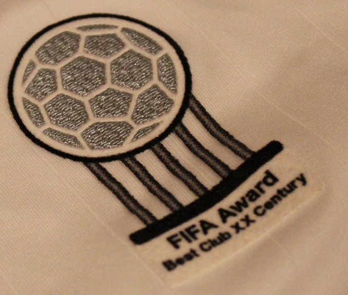 Logo «FIFA Club of the Century» bordado en la camiseta del Real Madrid CF de la temporada 2006/07, que condecora el galardón que la FIFA otorgó en el año 2000 al Real Madrid CF, distinguiéndolo como «Mejor Club del SXX».